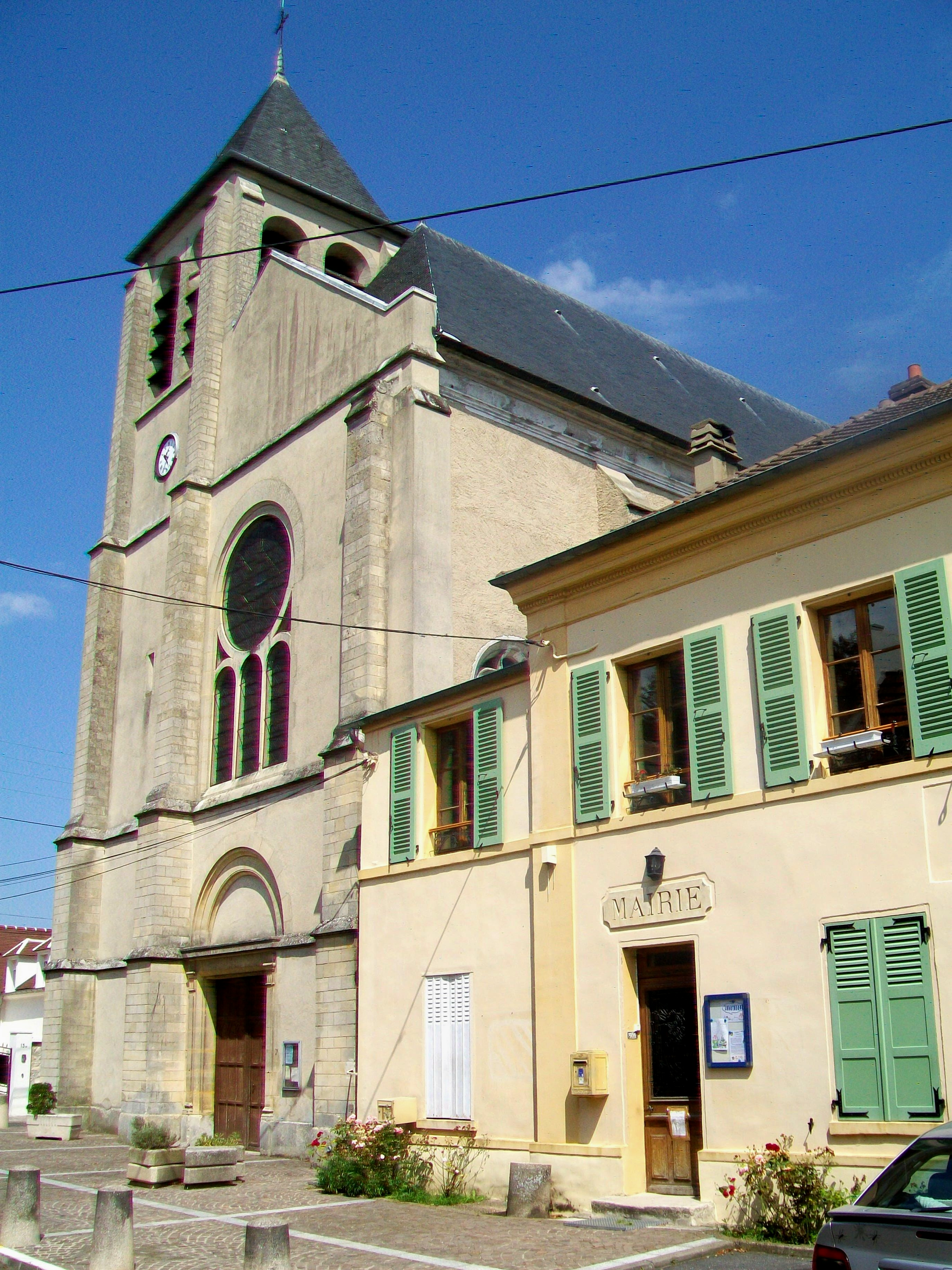 Vue depuis la rue de la Mairie (à droite, la mairie).